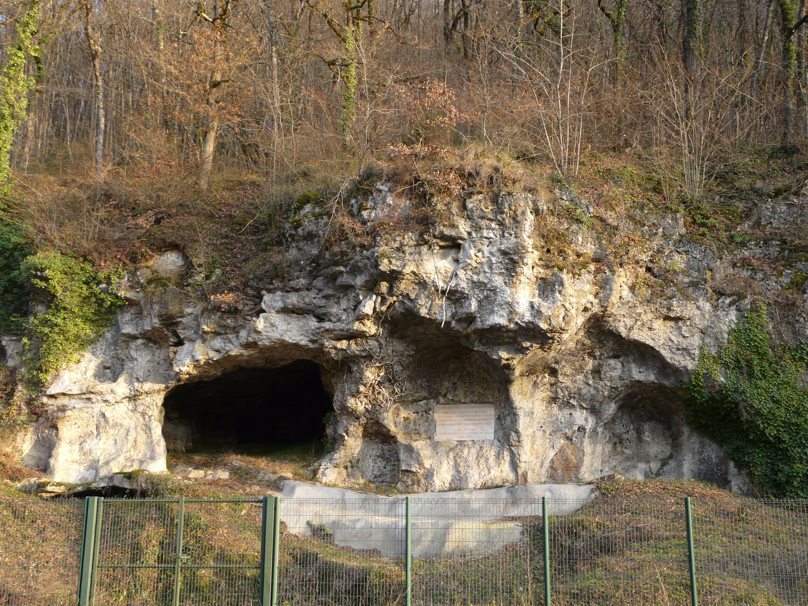 En bordure de la route départementale 939, l'abri de Raymonden à Chancelade, Dordogne, France Object location45° 12′ 39.4″ N, 0° 40′ 24.5″ E